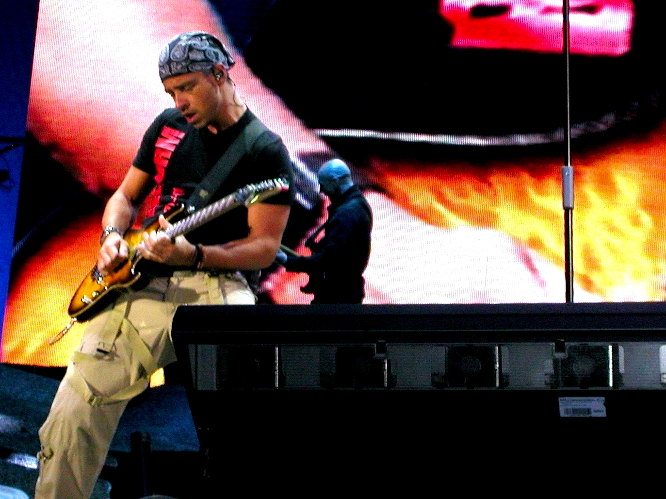 Eros Ramazzotti mentre suona la chitarra